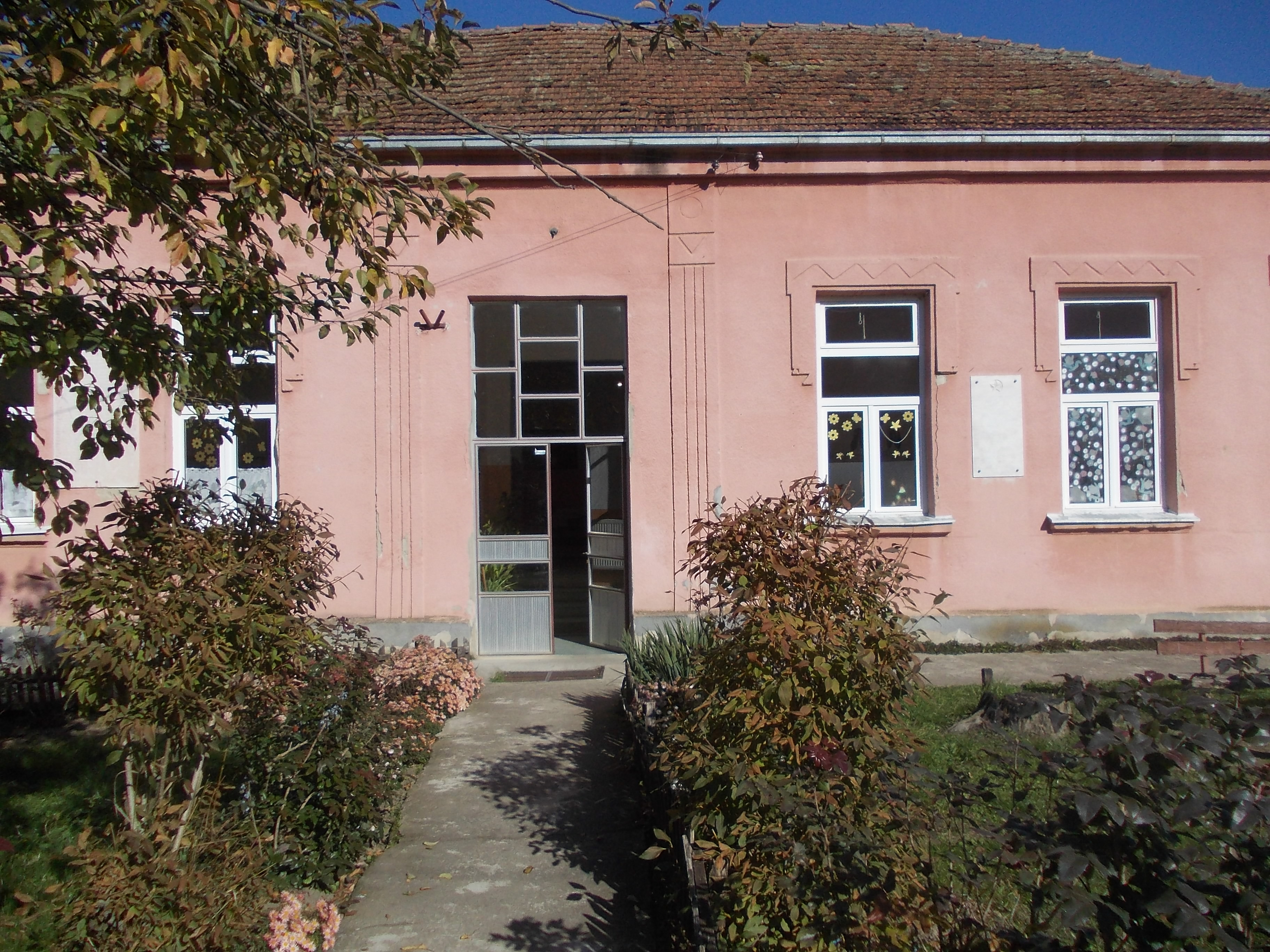 OŠ "Radislav Nikčević" u Dragoševcu